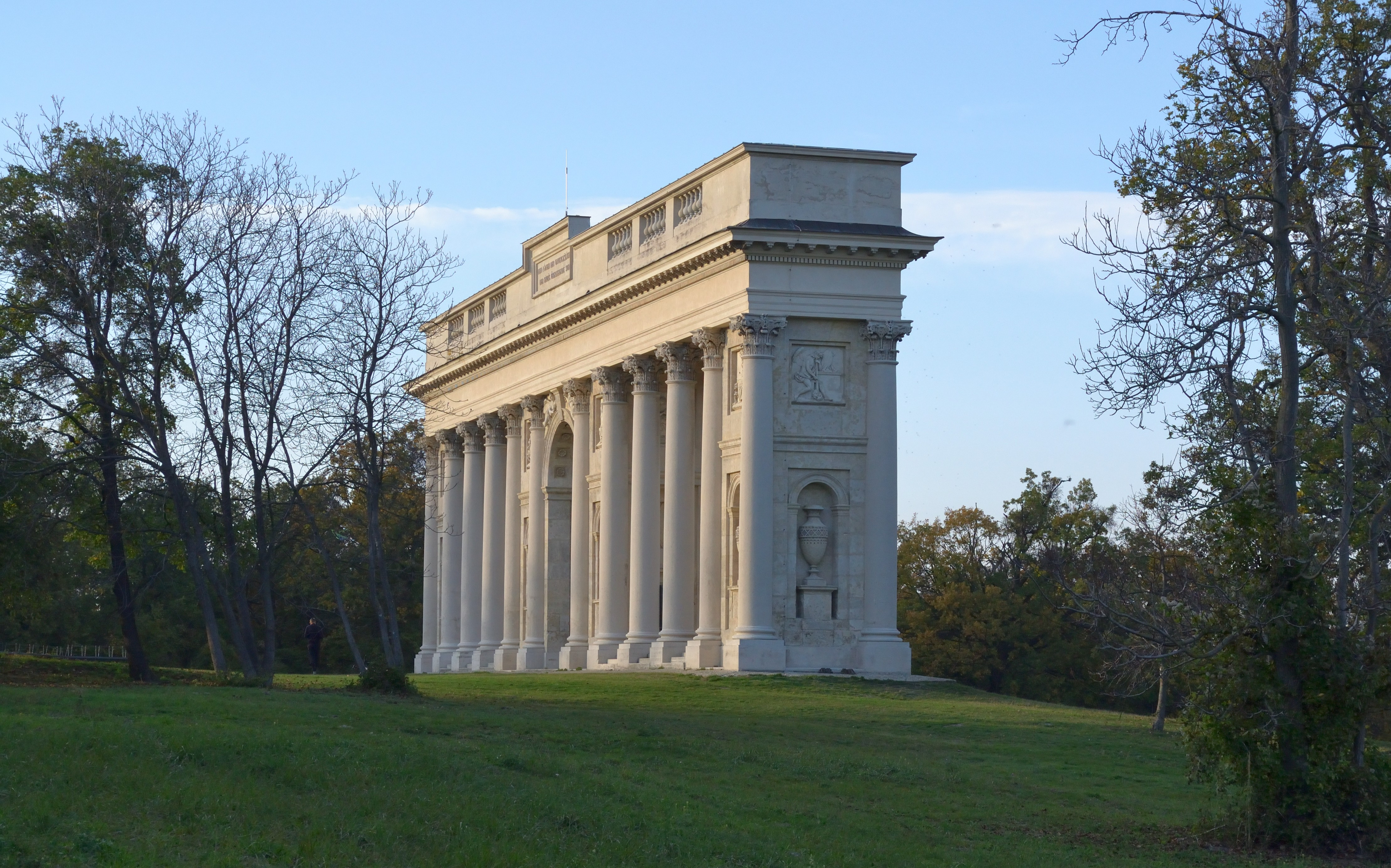 Valtice - kolonáda na Rajstně, pohled od JV.